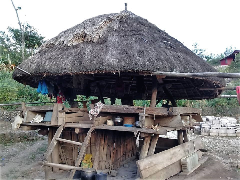 Obulo, Atsabe, Ermera, Osttimor